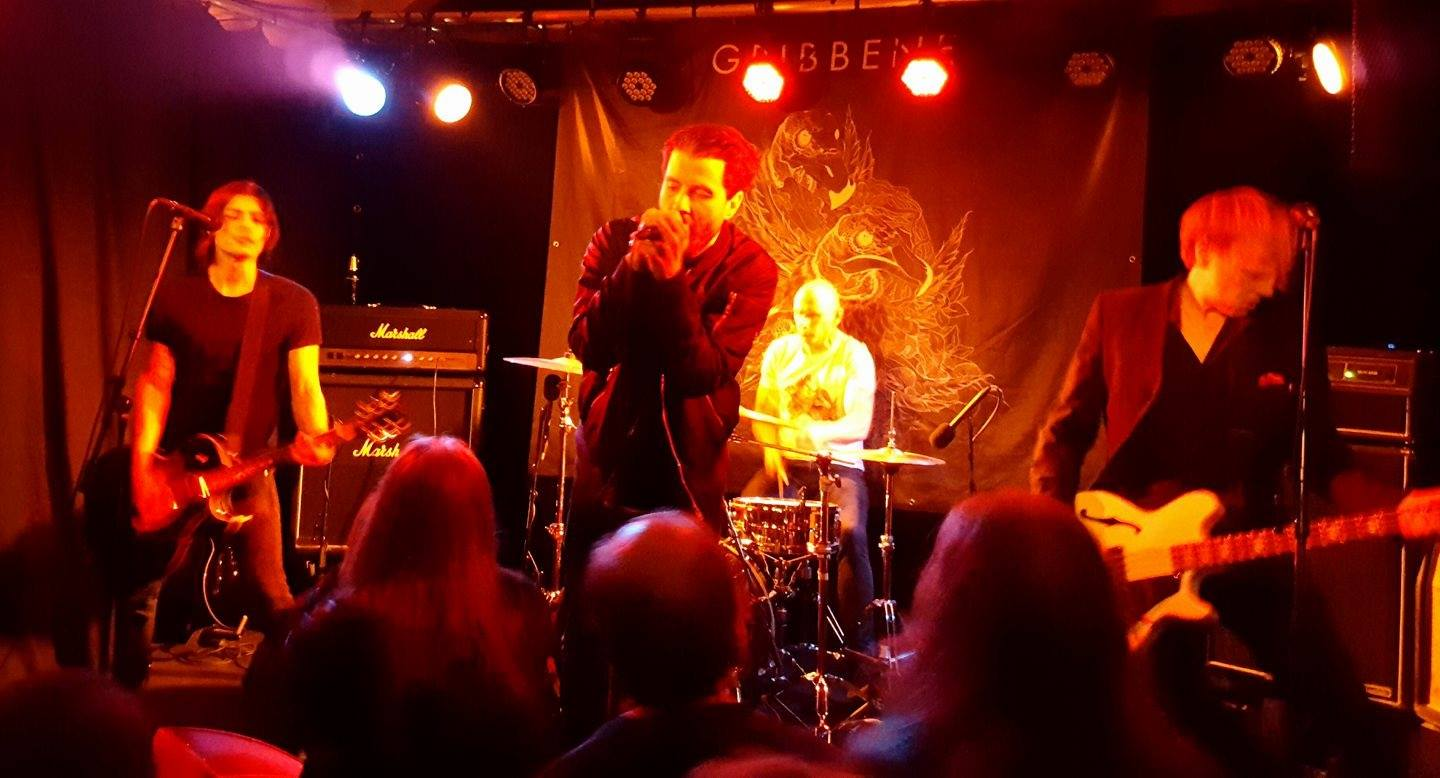 Gribbene spiller konsert påKrøsset i Oslo